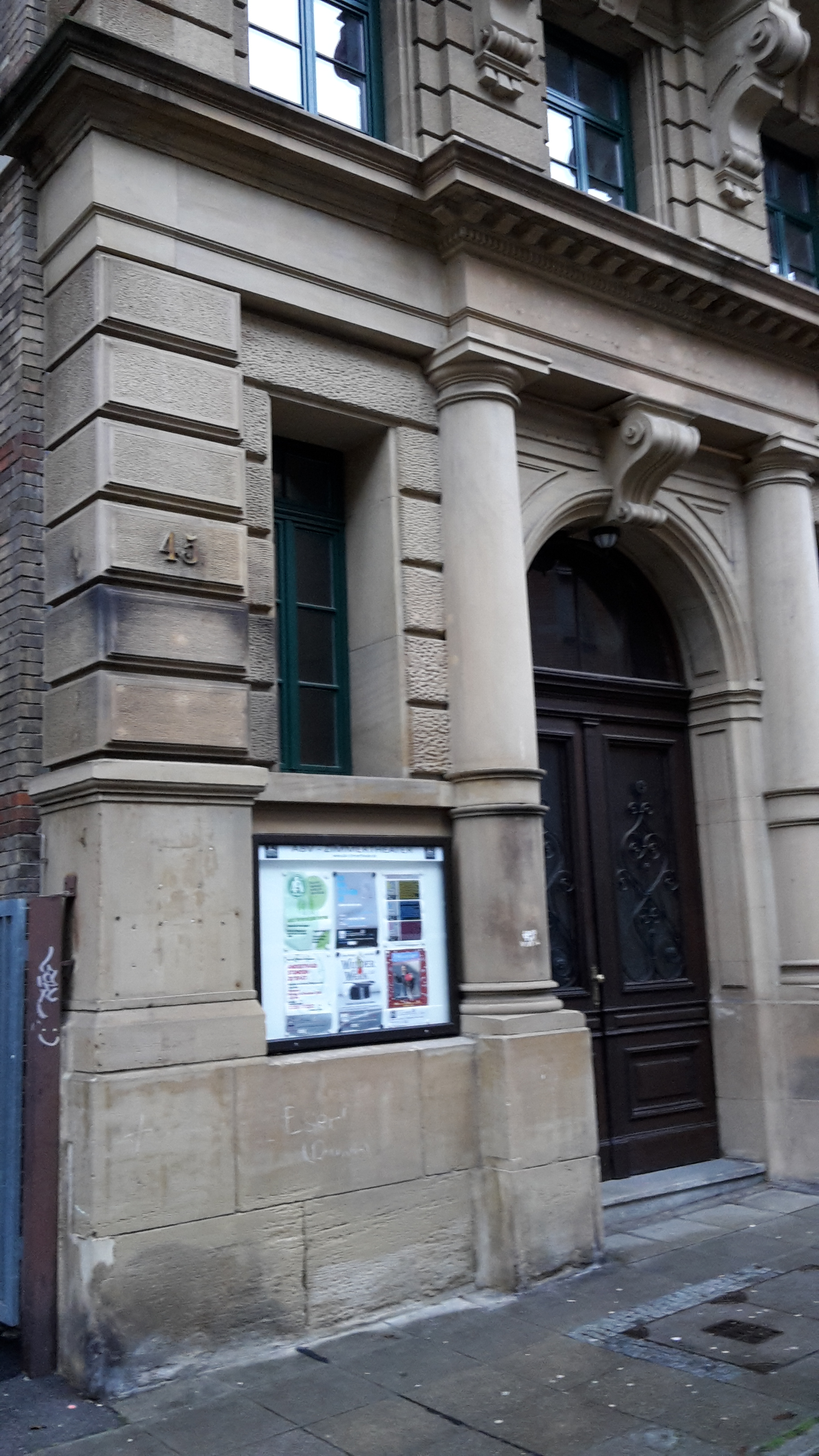 Eingang zum Eduard-Pfeiffer-Haus Stuttgart mit Programm-Schaukasten des ABV-Zimmertheaters